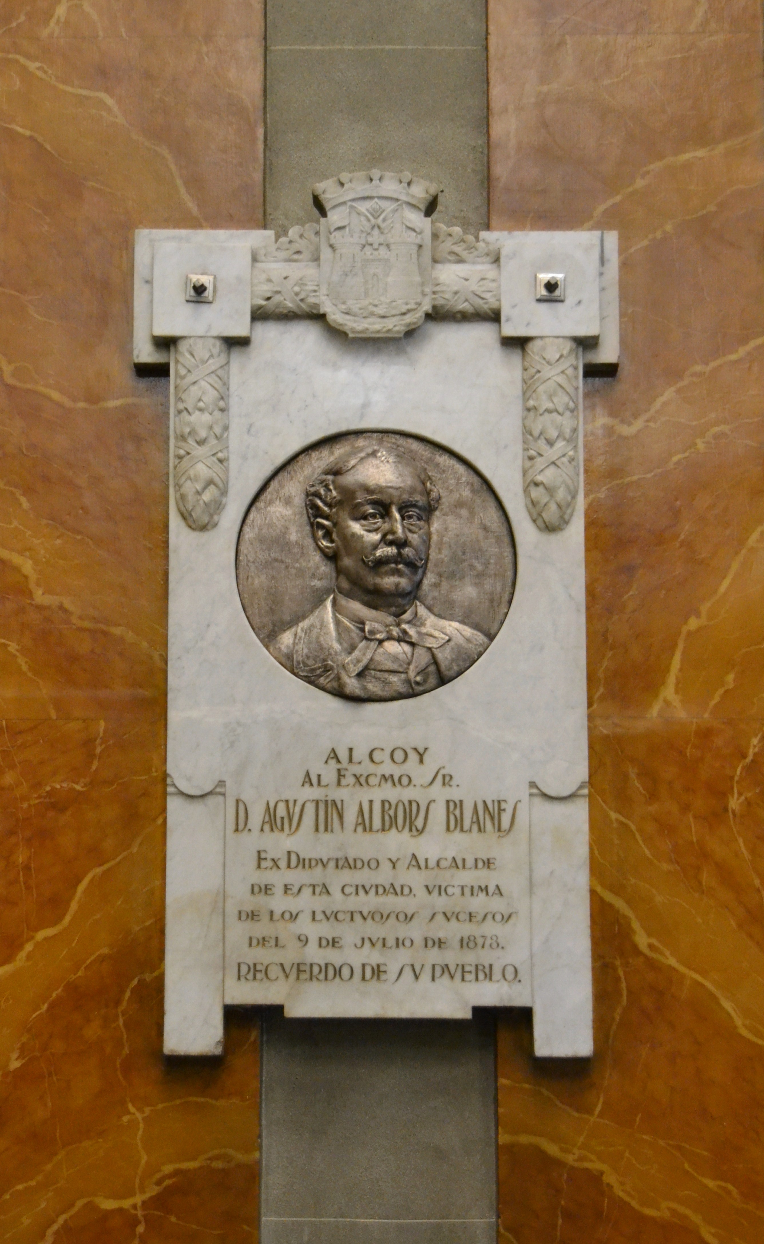 Placa a Agustí Albors i Blanes a l'ajuntament, Alcoi.